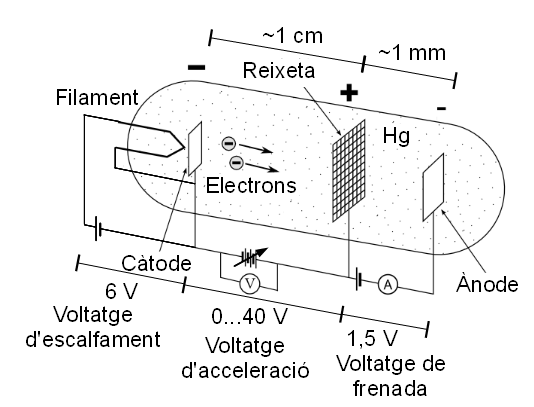 Esquema de l'aparell emprat per James Franck i Gustav L. Hertz el 1914.